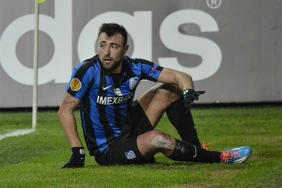 Олексій Антонов 30 листопада 2013 року під час матчу із загребським Динамо.